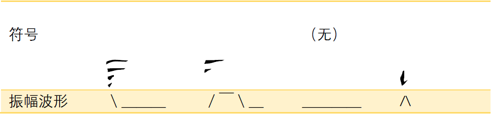 中文（中国大陆）: 使用画图工具制作的Ar Ciela字体中AMCL的显示样子